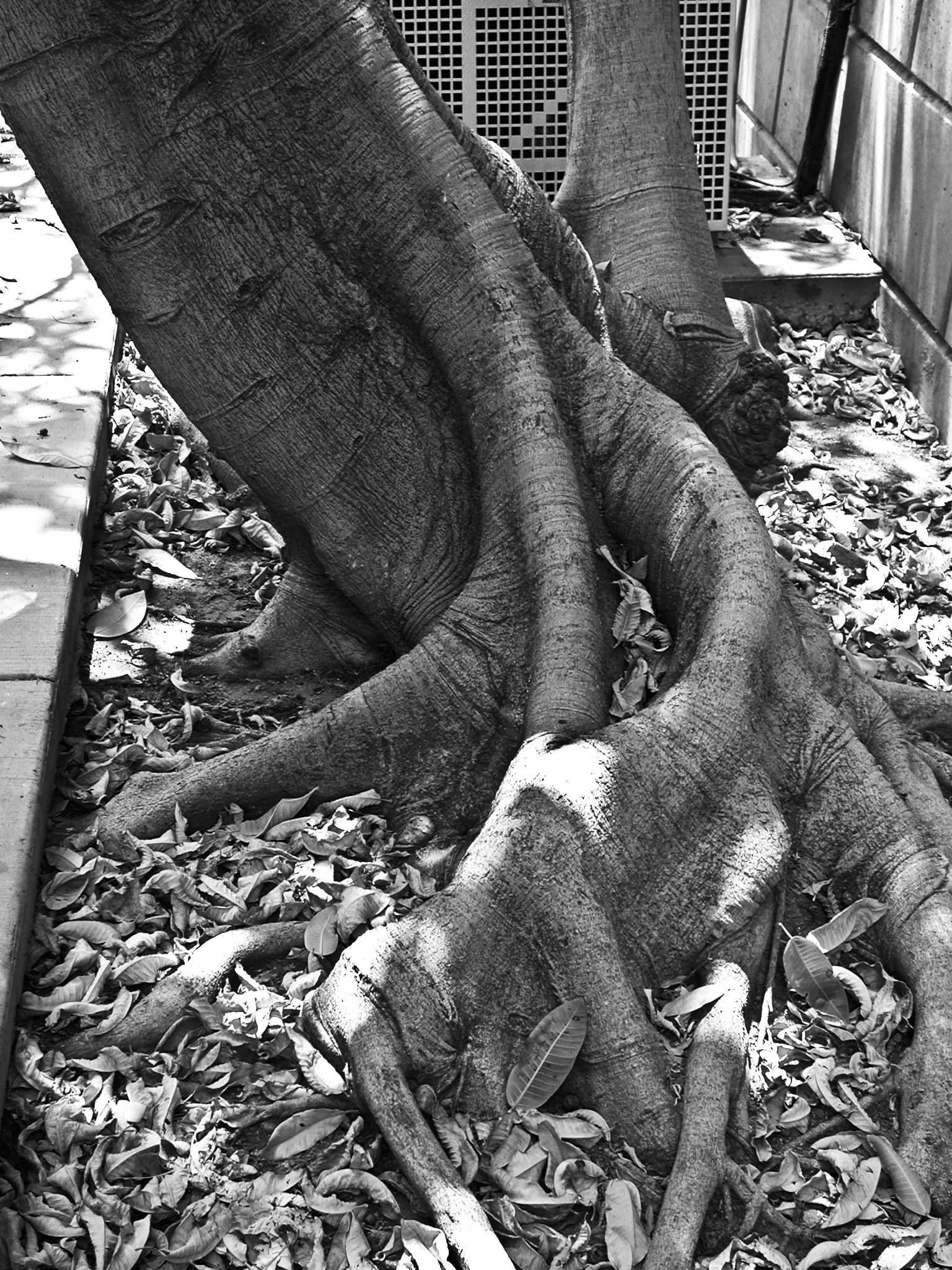 ficus_insipida_roots